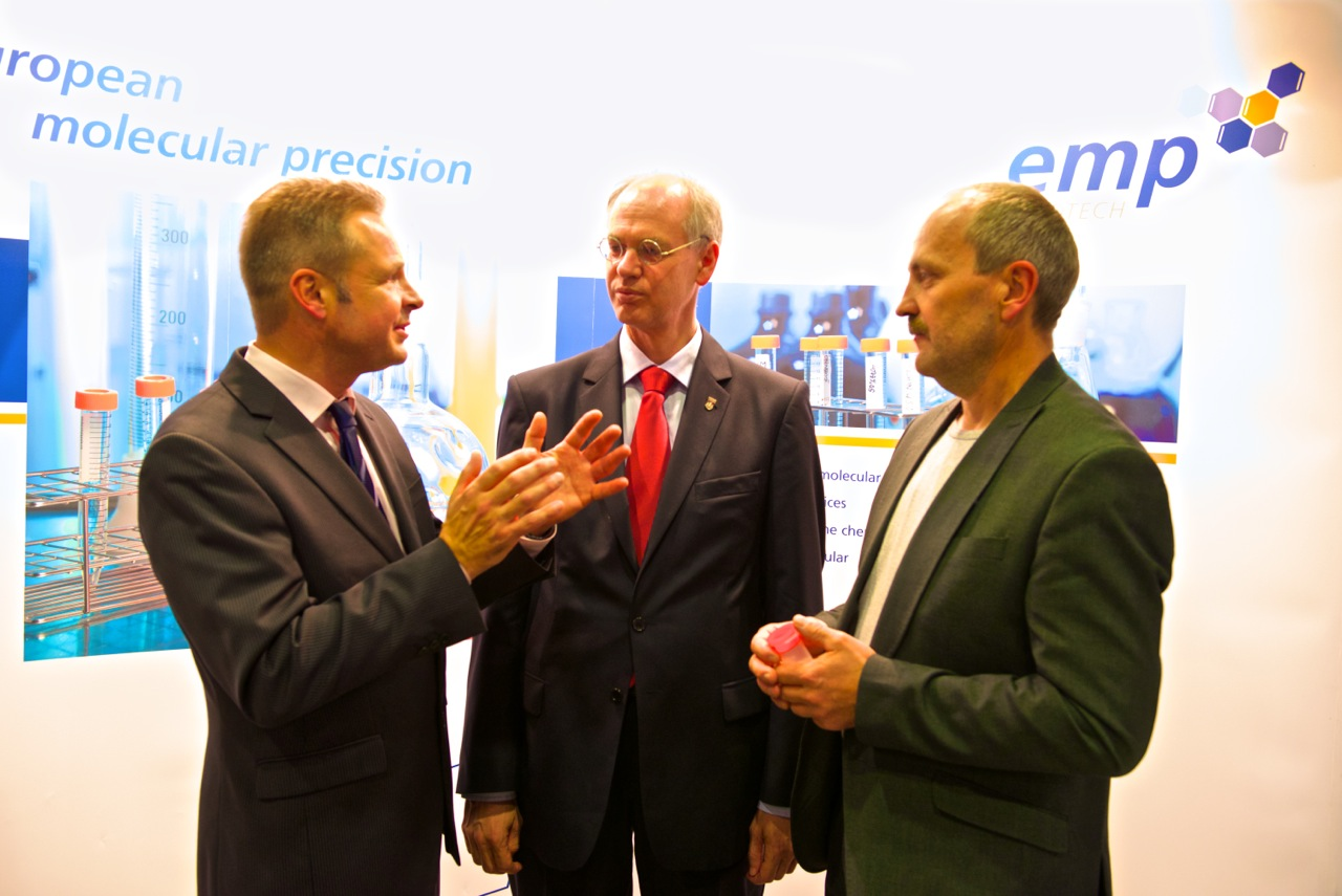 19. Pankower Wirtschaftstag 24. Oktober 2013 (v.l.n.r: Dr. Ulrich Scheller, Geschäftsführer der BBB Management GmbH, Bezirksbürgermeister Matthias Köhne, Dr. Uwe Möller, Geschäftsführer der EMP Biotech GmbH)